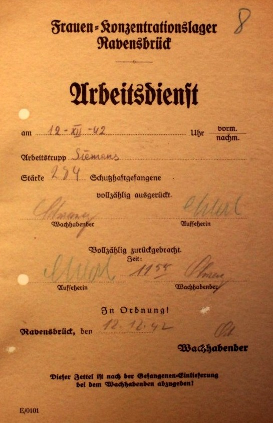 12.12.1942, um 12:54 wurden 284 Schutzhaftgefangene vom Arbeitsdienst im Siemenslager zum Mittagessen im Hauptlager abgeliefert.